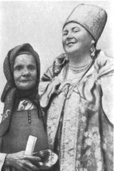 Мария Дмитриевна Кривополенова, русская сказительница (слева) и Озаровская Ольга Эрастовна, фольклорист (справа), 1915